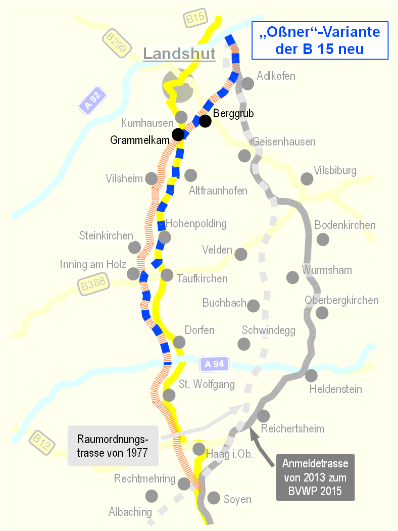 B 15 neu - "Oßner"-Vorschlag für einen alternativen Trassenverlauf vom 14. Januar 2015